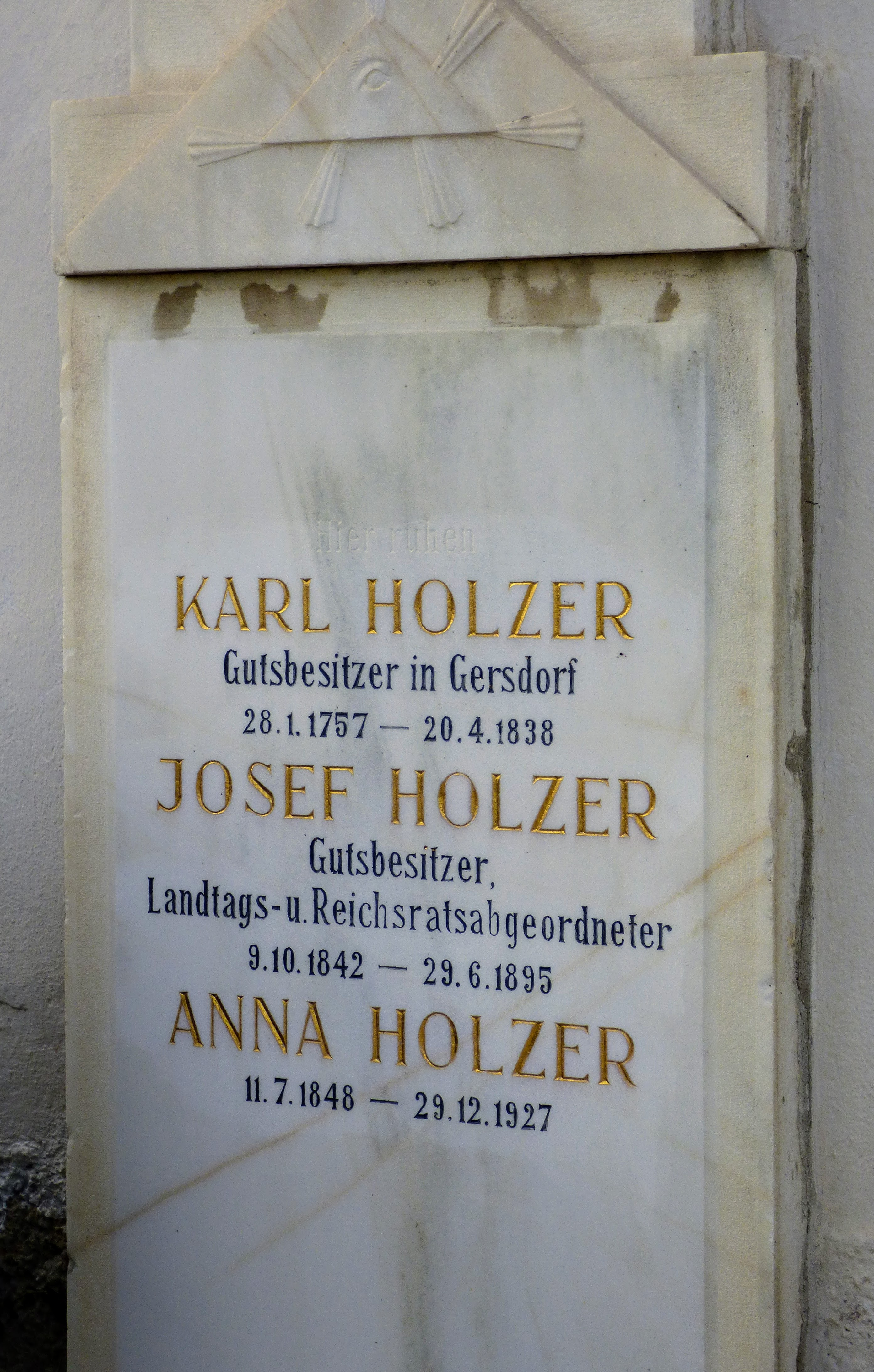 Pfarrkirche Pörtschach am Berg: Grabstein Holzer Josef, Gersdorf